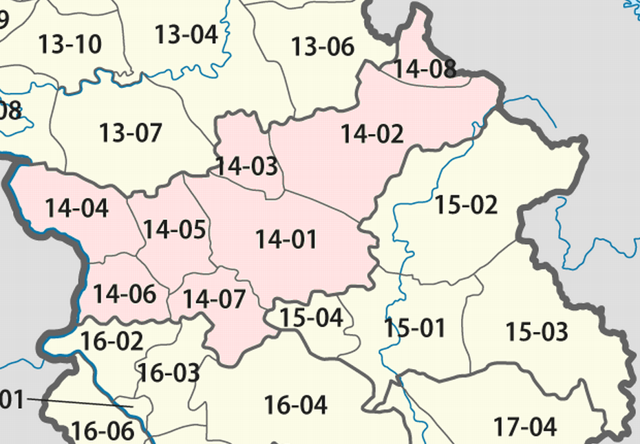 Giấy phép